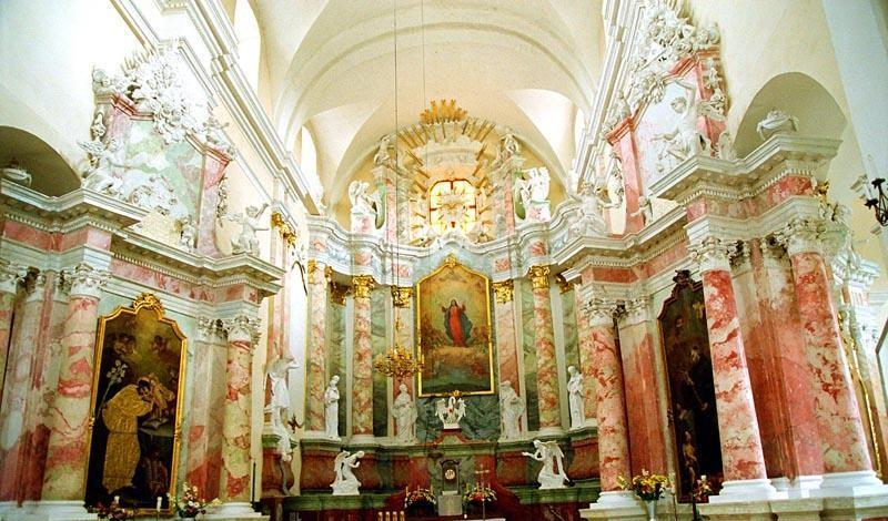 Kościół franciszkanów w Drohiczynie. Ołtarz główny z XVIII wieku.